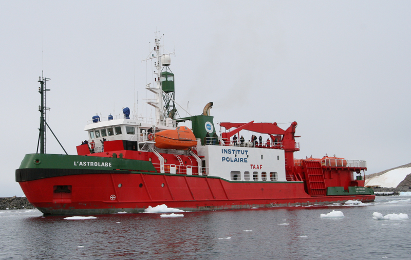 L'Astrolabe à la fin d'une rotation (R2, de janvier).